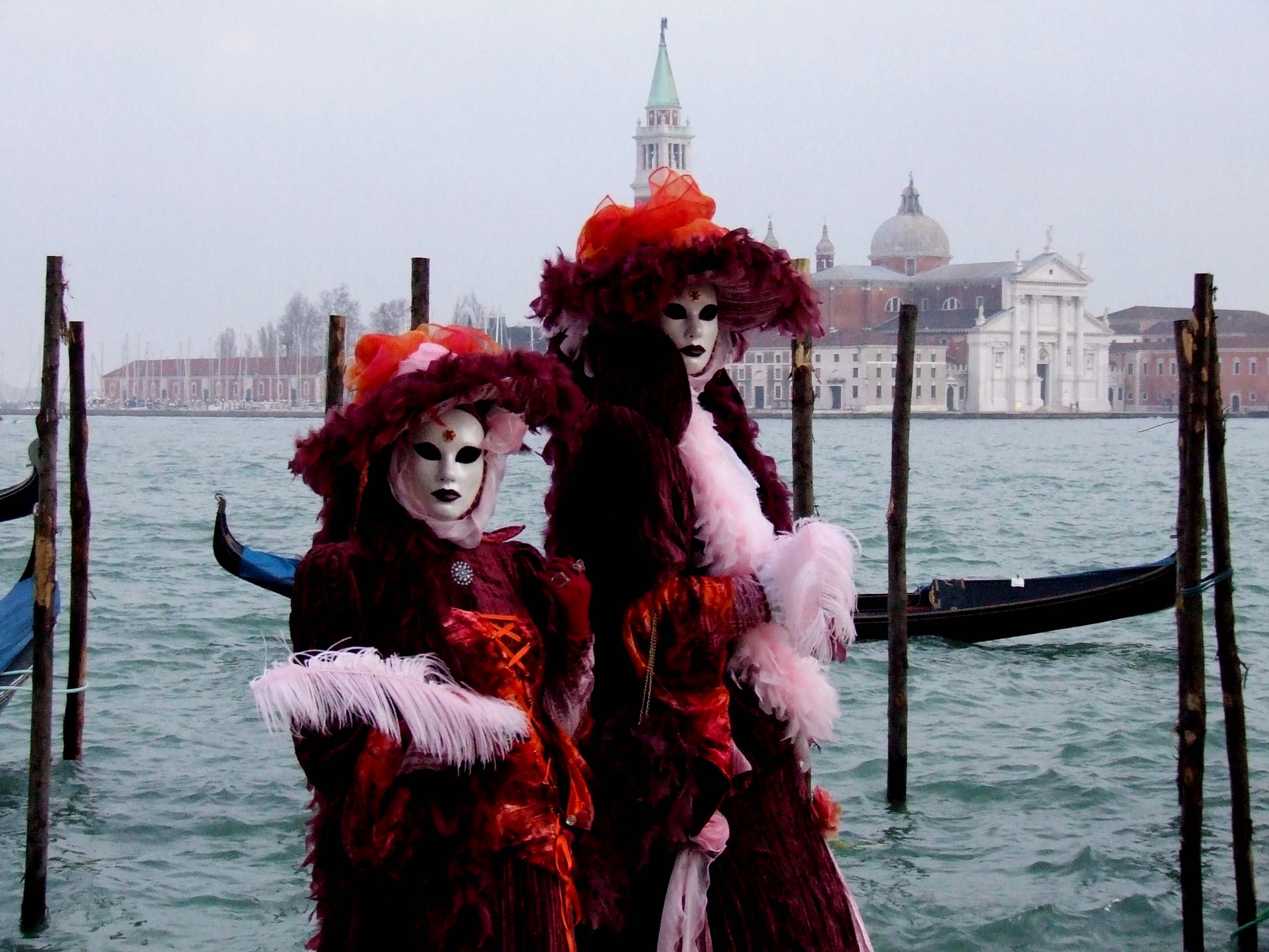 Tipični predstavnici beneškega karnevala, z gondolo in otočkom v ozadju. Posnetek s karnevala 2007. avtorica: Ines Zgonc Inki 17:56, 18 February 2007 (UTC)